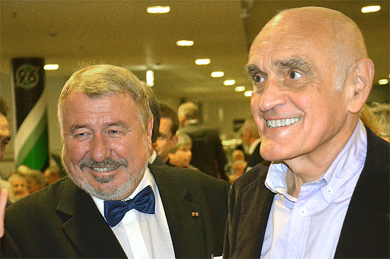 Zur 350-Jahr-Feier der Gottfried Wilhelm Leibniz Bibliothek – Niedersächsische Landesbibliothek und der Verabschiedung ihres Bibliotheksdirektors in den (Un-)Ruhestand wurden die rund 600 Gäste im Stadion des Sportvereins Hannover 96 lächelnd begrüßt durch den Bibliothekar Georg Ruppelt (links) und den Gastgeber Martin Kind ...